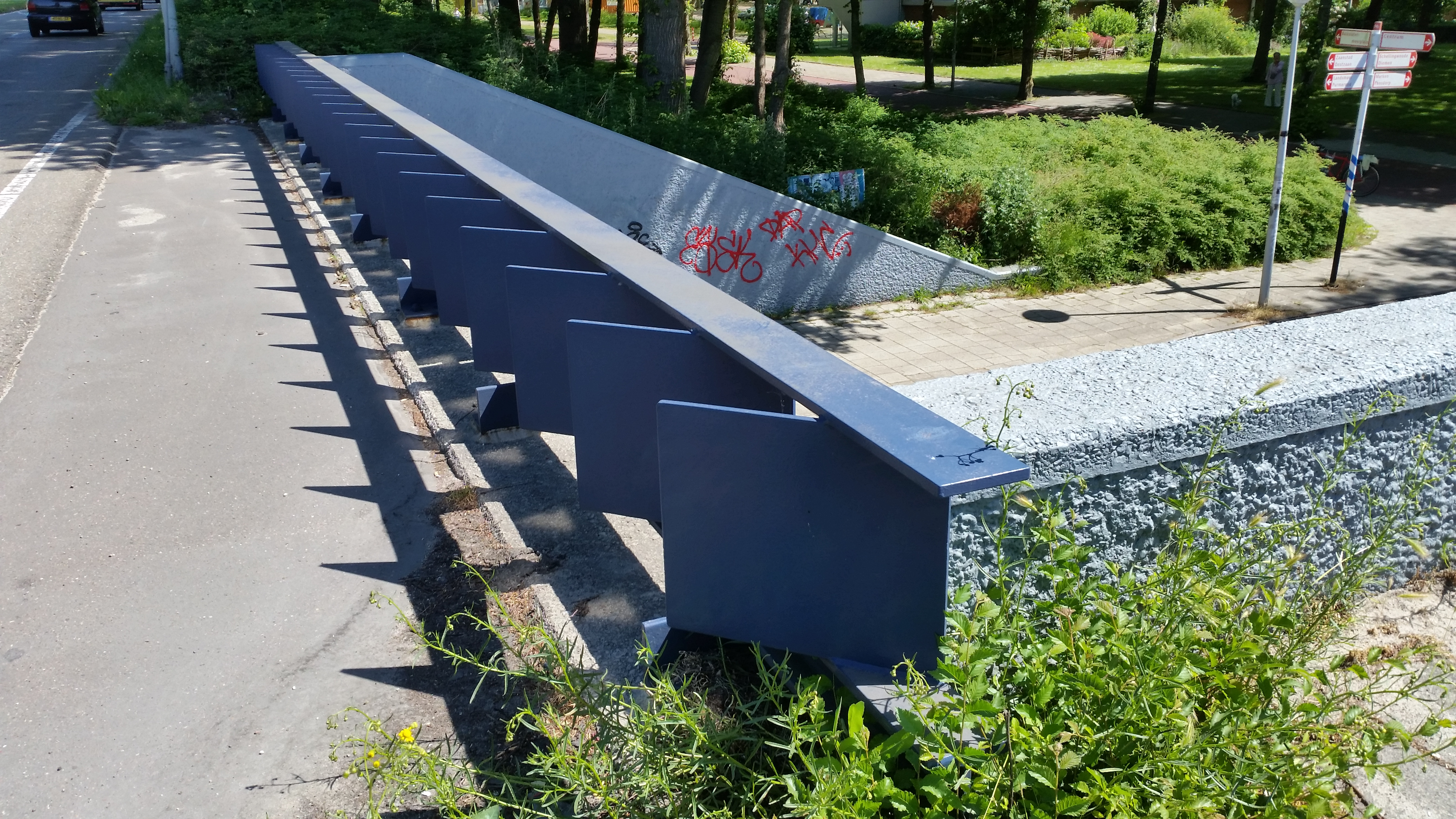 Impressie van Brug 939 in de Waddenweg en Nieuwe Purmerweg, Amsterdam-Noord (mei 2020)